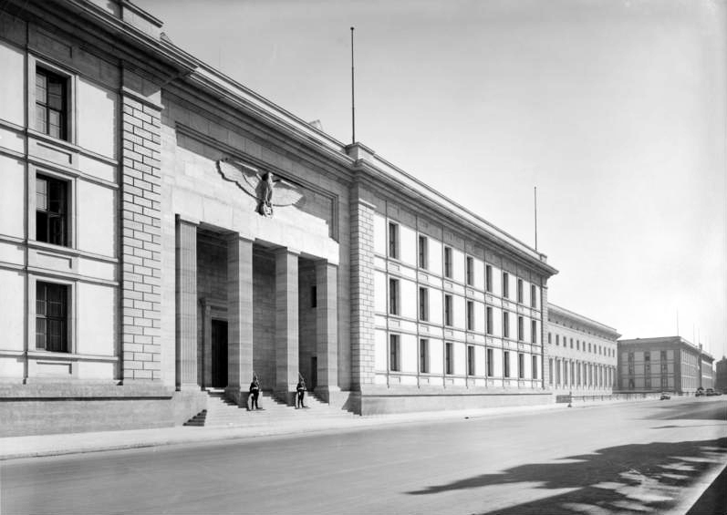 Reichsbahnzentrale für den Deutschen Reiseverkehr: Berlin, Die Neue Reichskanzlei, Voß Strasse, erworben: 2.6.39